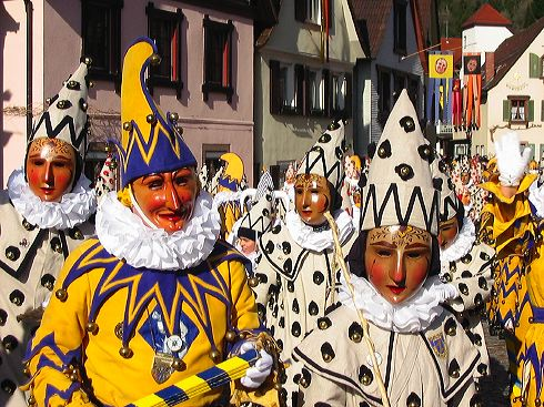 Wolfacher Hansel beim Fastnachtsumzug